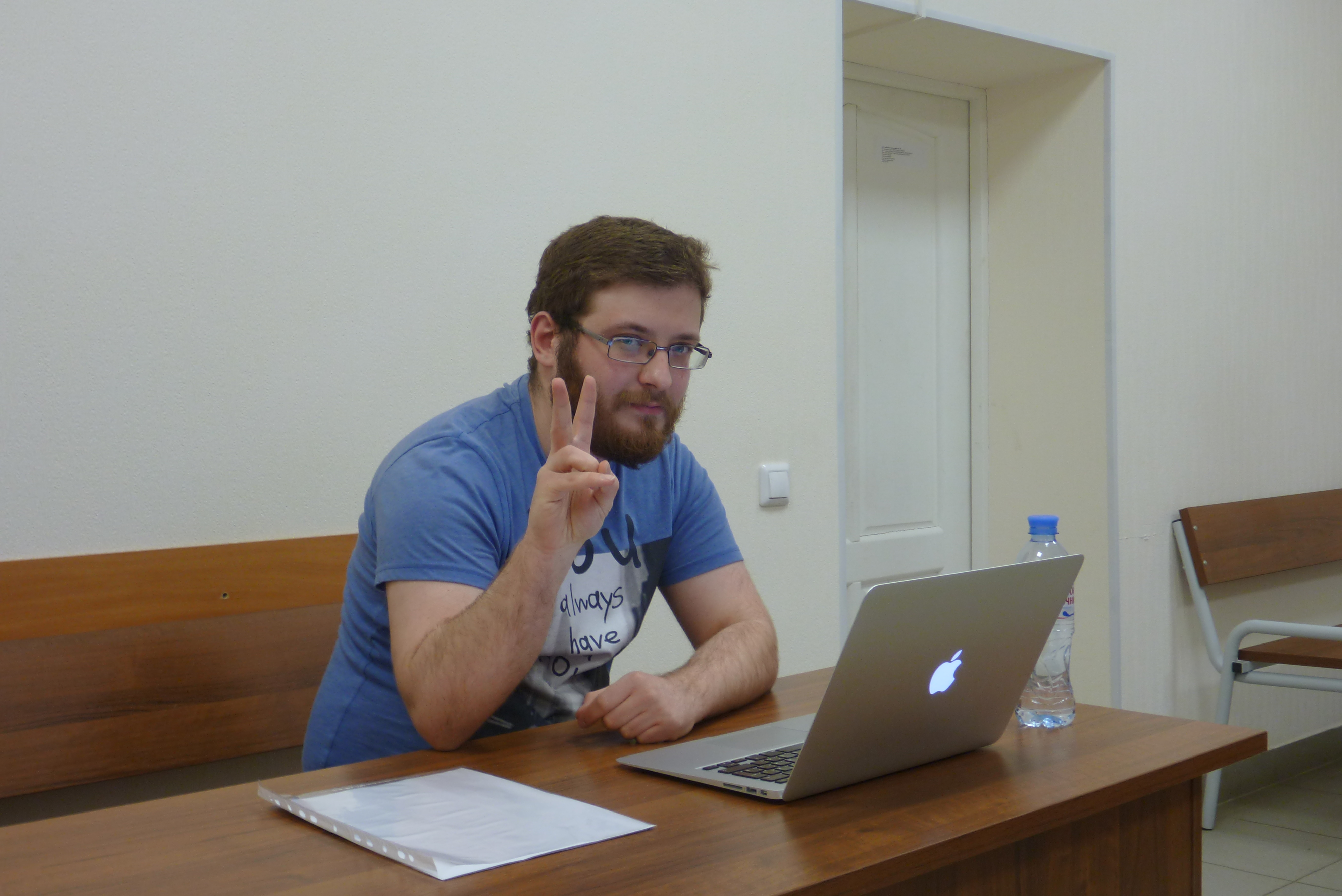 Максим Верников на участке мирового судьи 17 января 2019 года